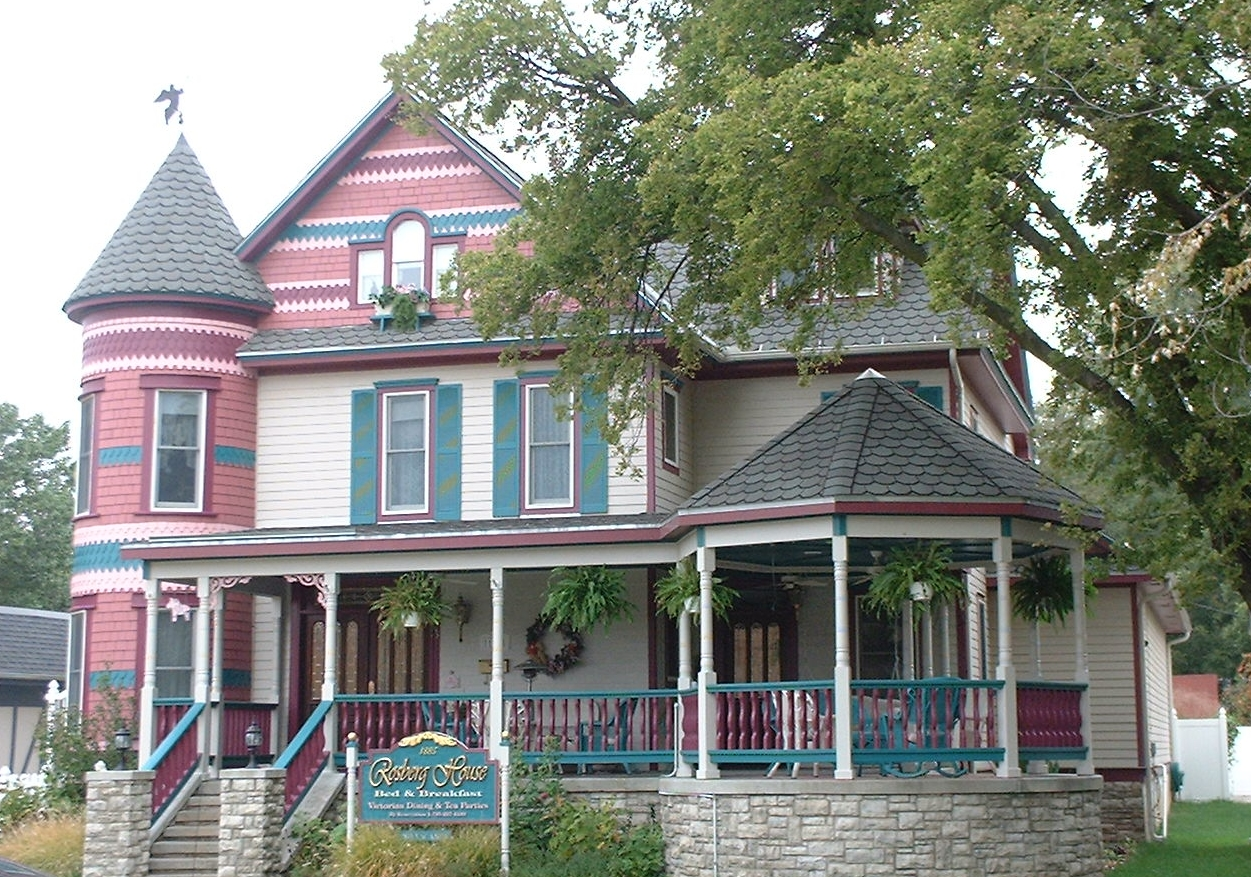 Rosberg House Bed in Lindsborg, Kansas, U.S.